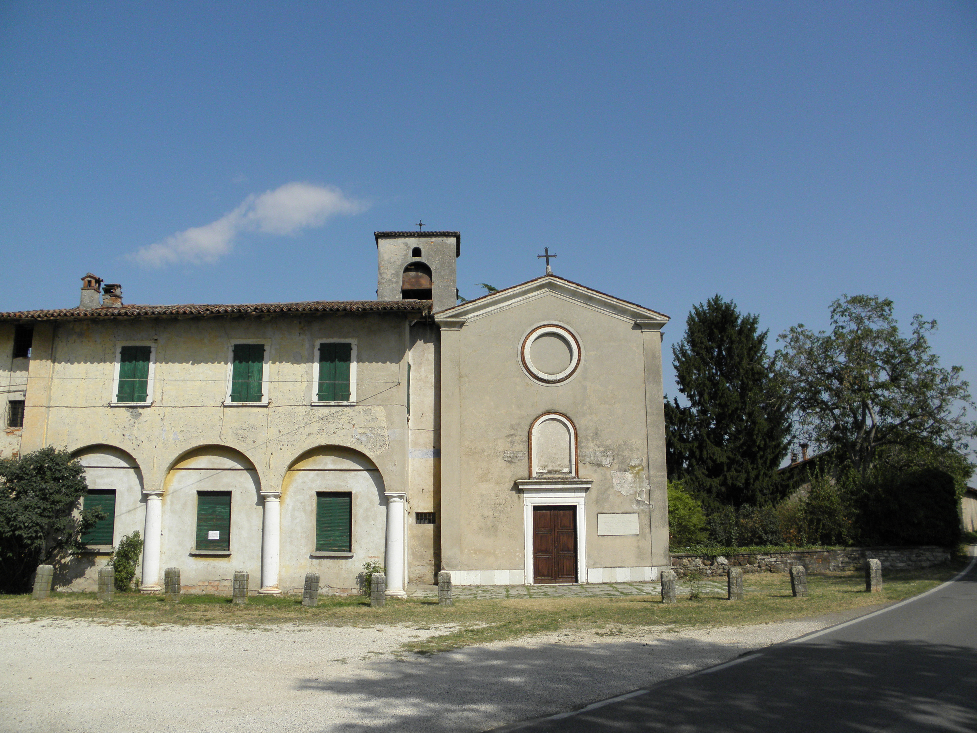 San Giacomo, frazione di Rezzato: la romanica chiesa di San Giacomo.